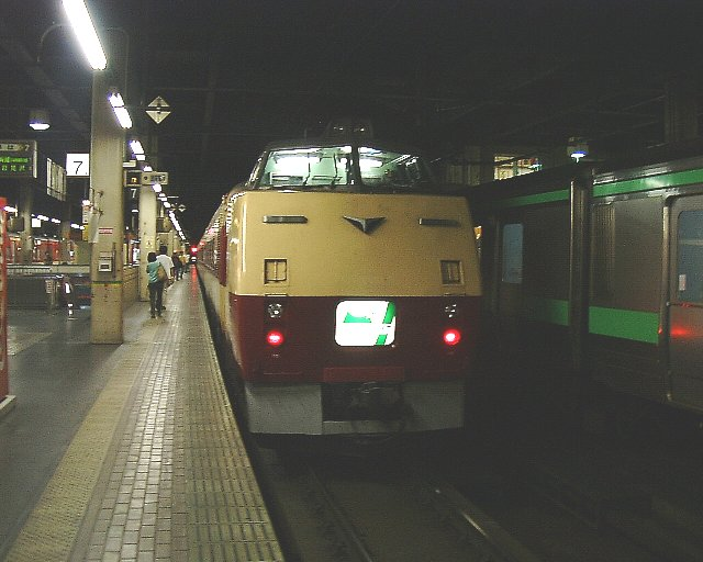 キハ183系国鉄色での快速「ミッドナイト」 札幌にて